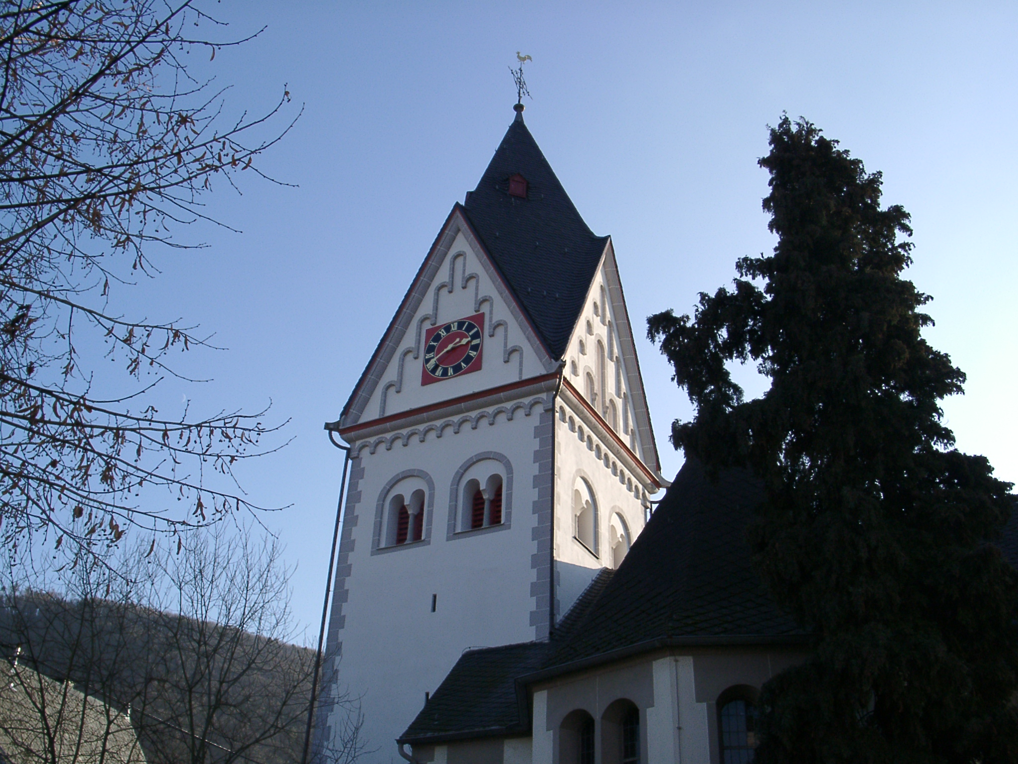 Kirchturm der ev. Kirche Winningen - selbst fotografiert (klaus Graf) 15.1.2005 - Lizenz: CC BY